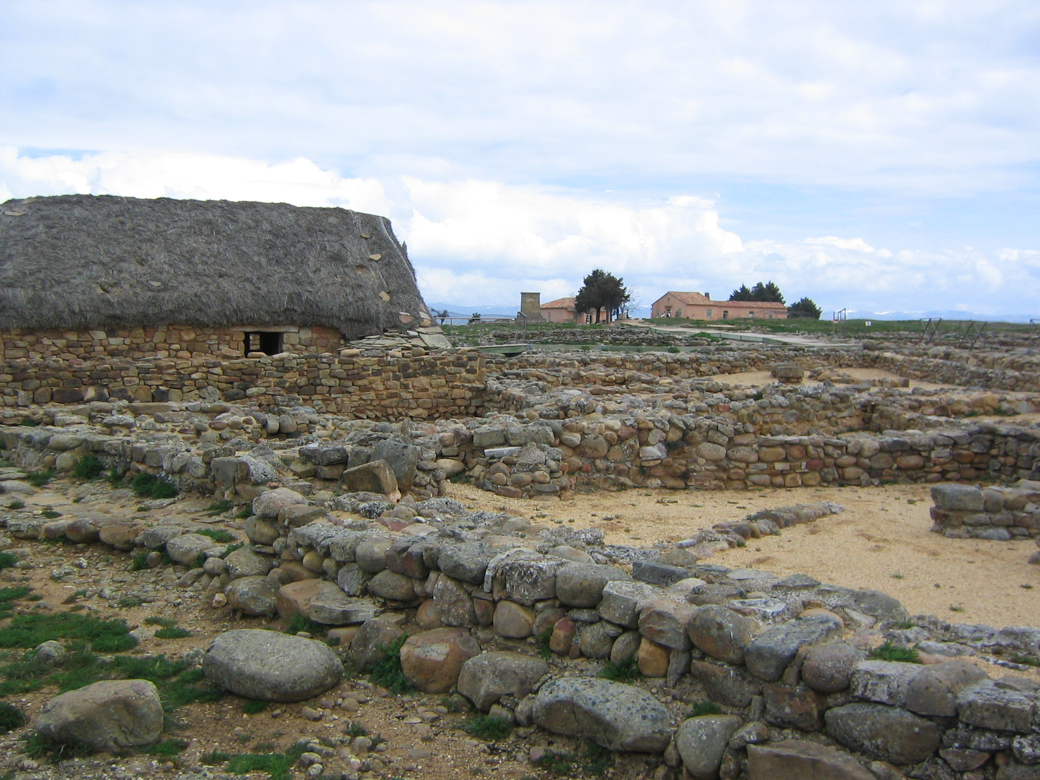 Vista de las excavaciones arqueológicas de Numancia (Soria, España)